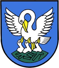 Wappen